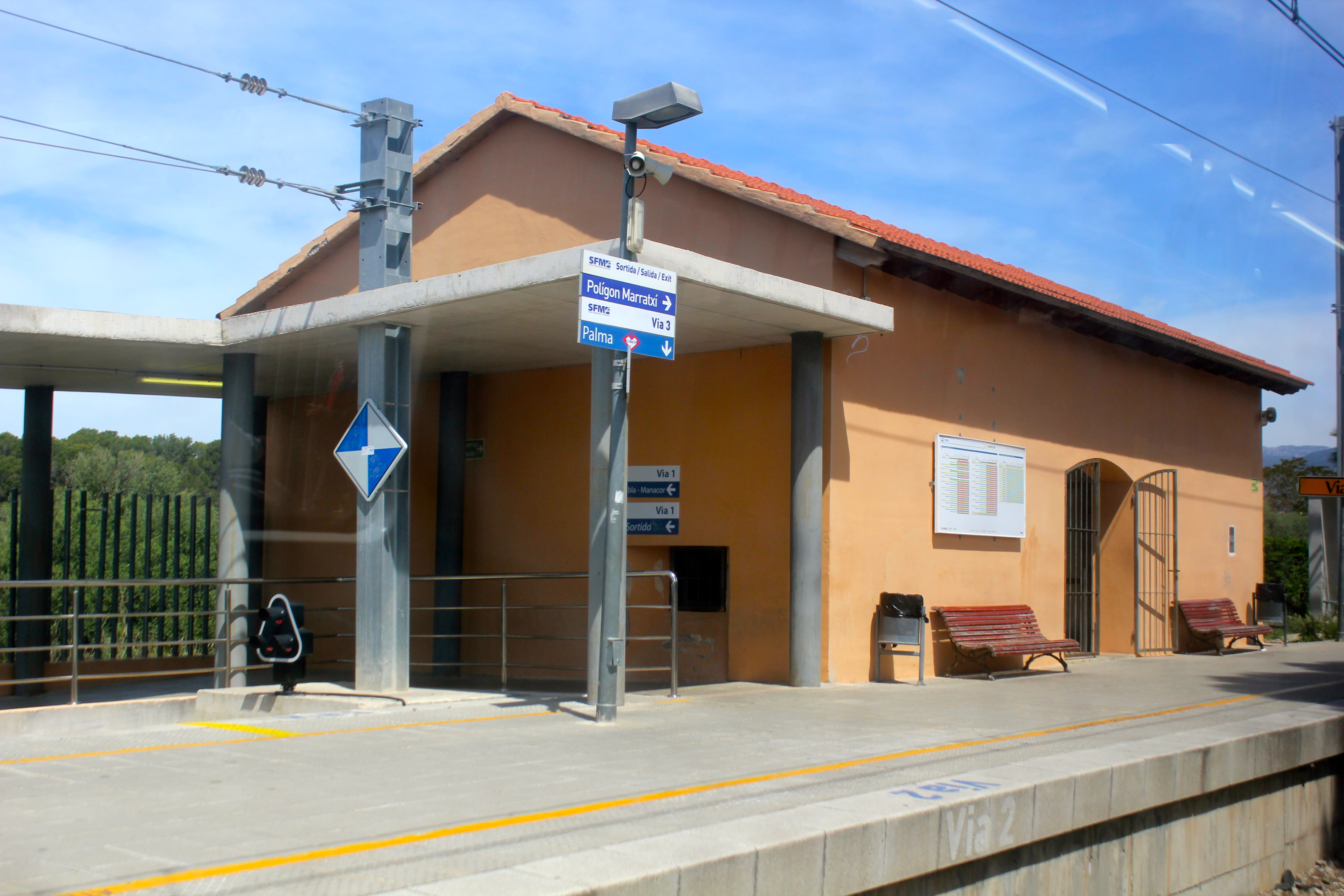 Estació de Marratxí, sala de espera